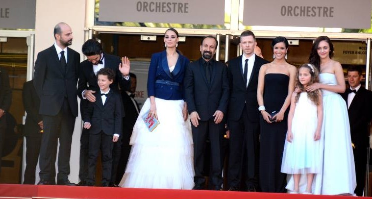 L'équipe du film Le Passé au festival de Cannes